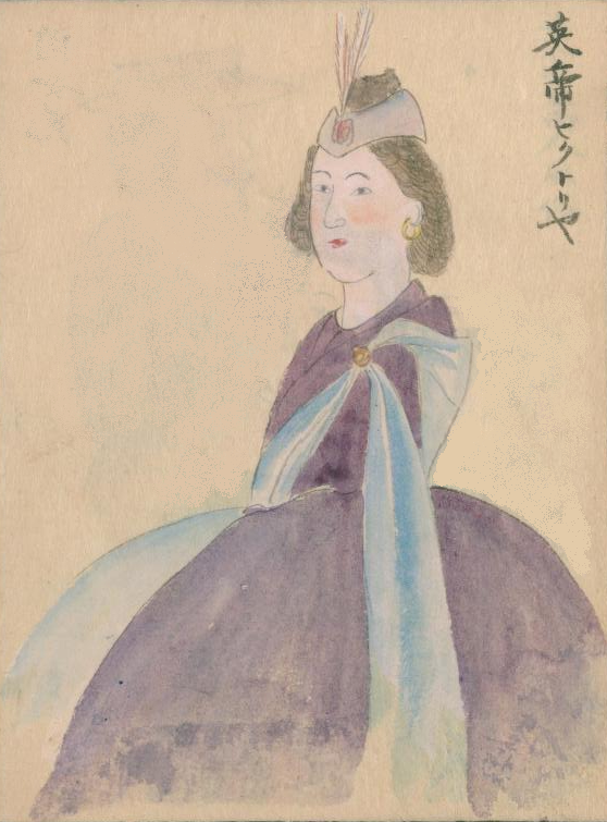 ヴィクトリア (イギリス女王) 高嶋祐啓『欧西行紀』